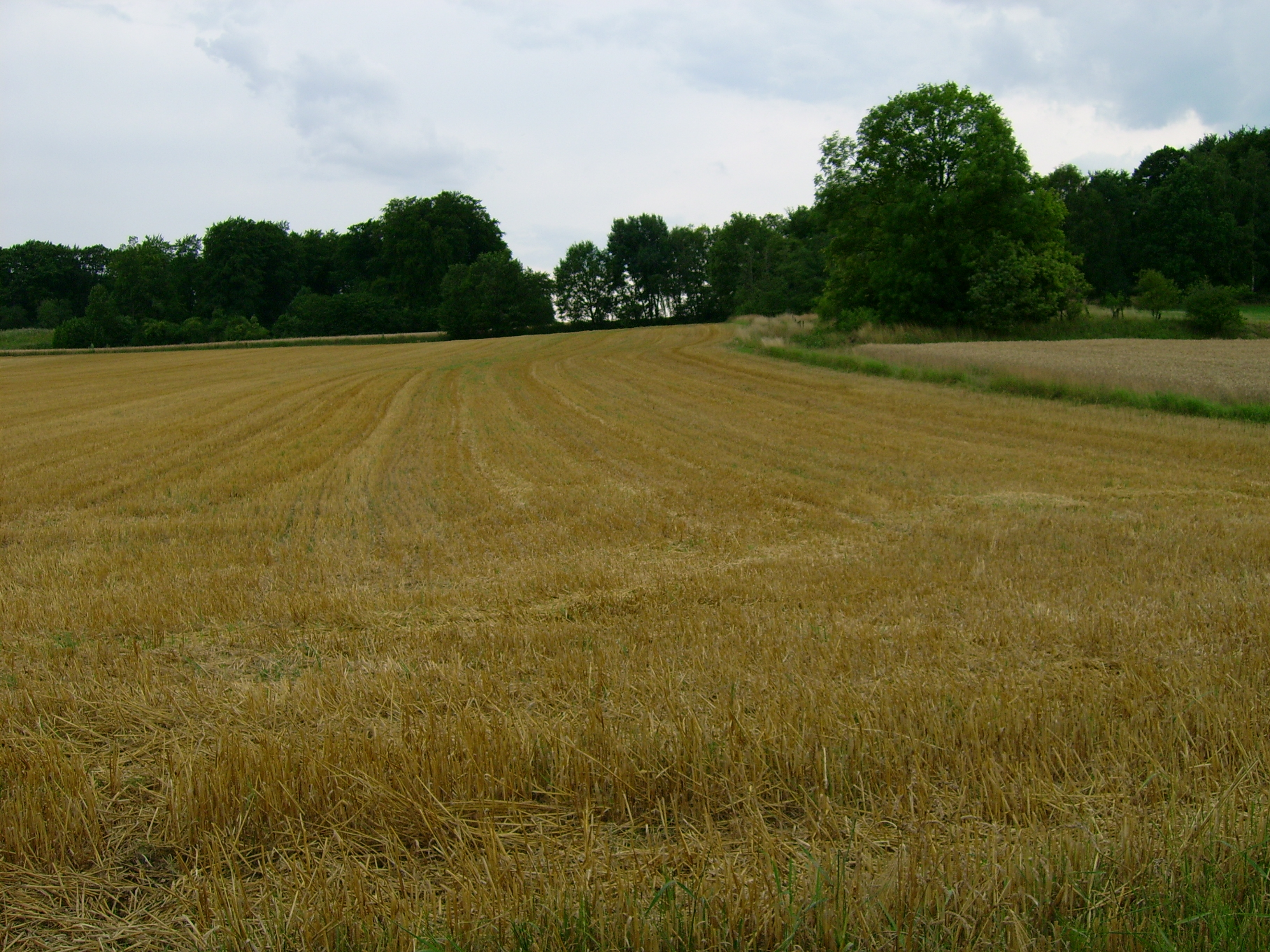 Blick zum Gipfel des Roten Berges in Hasbergen